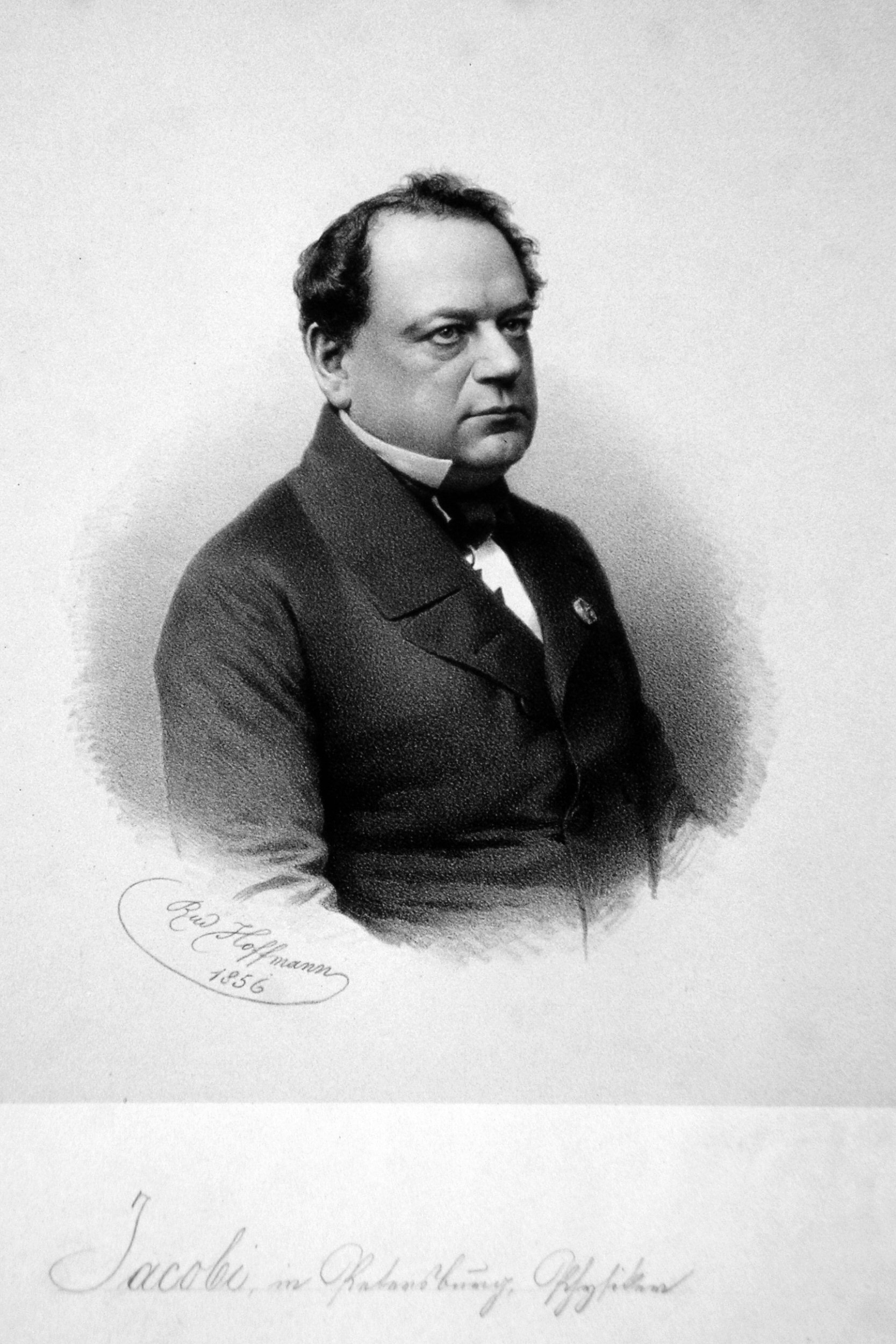 Moritz Hermann Jacobi, Lithographie von Rudolf Hoffmann, 1856.